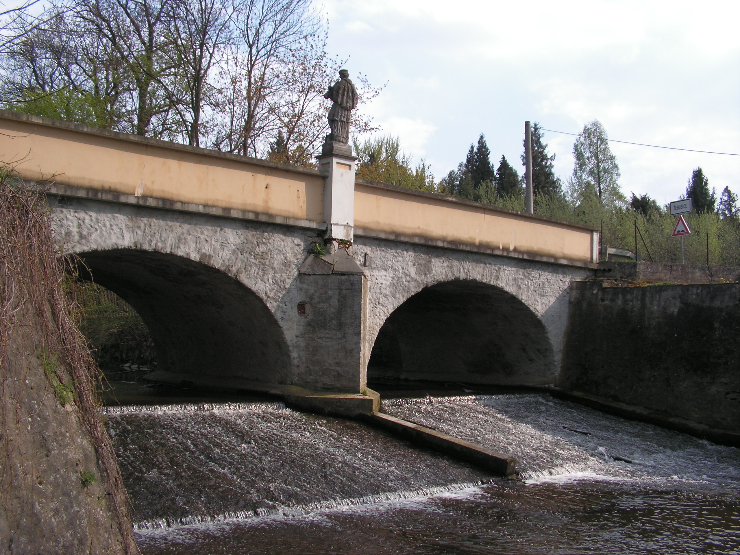 Barokní kamenný most přes řeku Doubravu v Žehušicích v okrese Kutná Hora